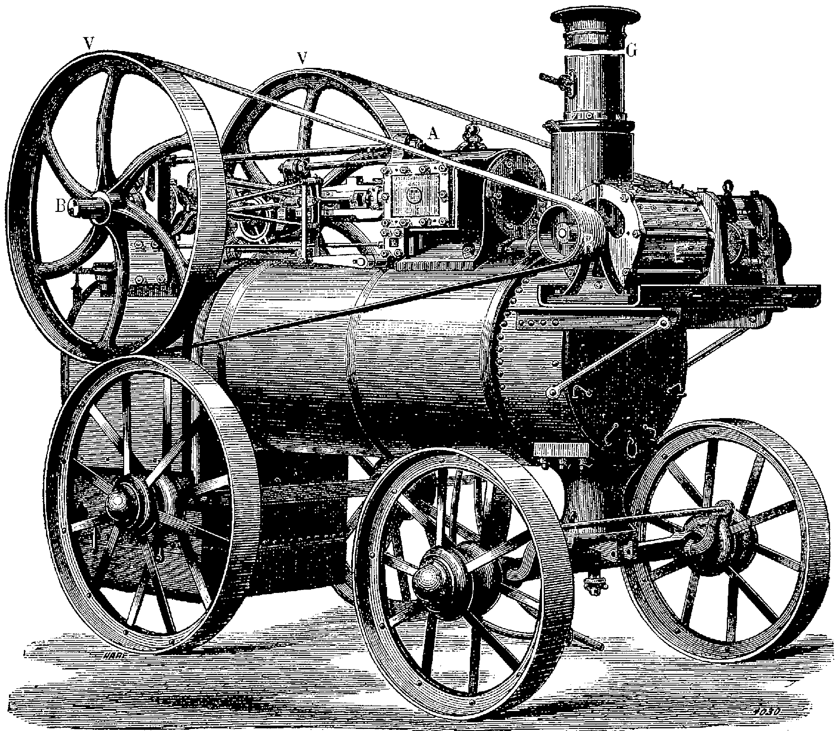 Locomobile à grande vitesse pour l’éclairage électrique de MM. Ransomes, Sims et Jefferies, de Lincoln